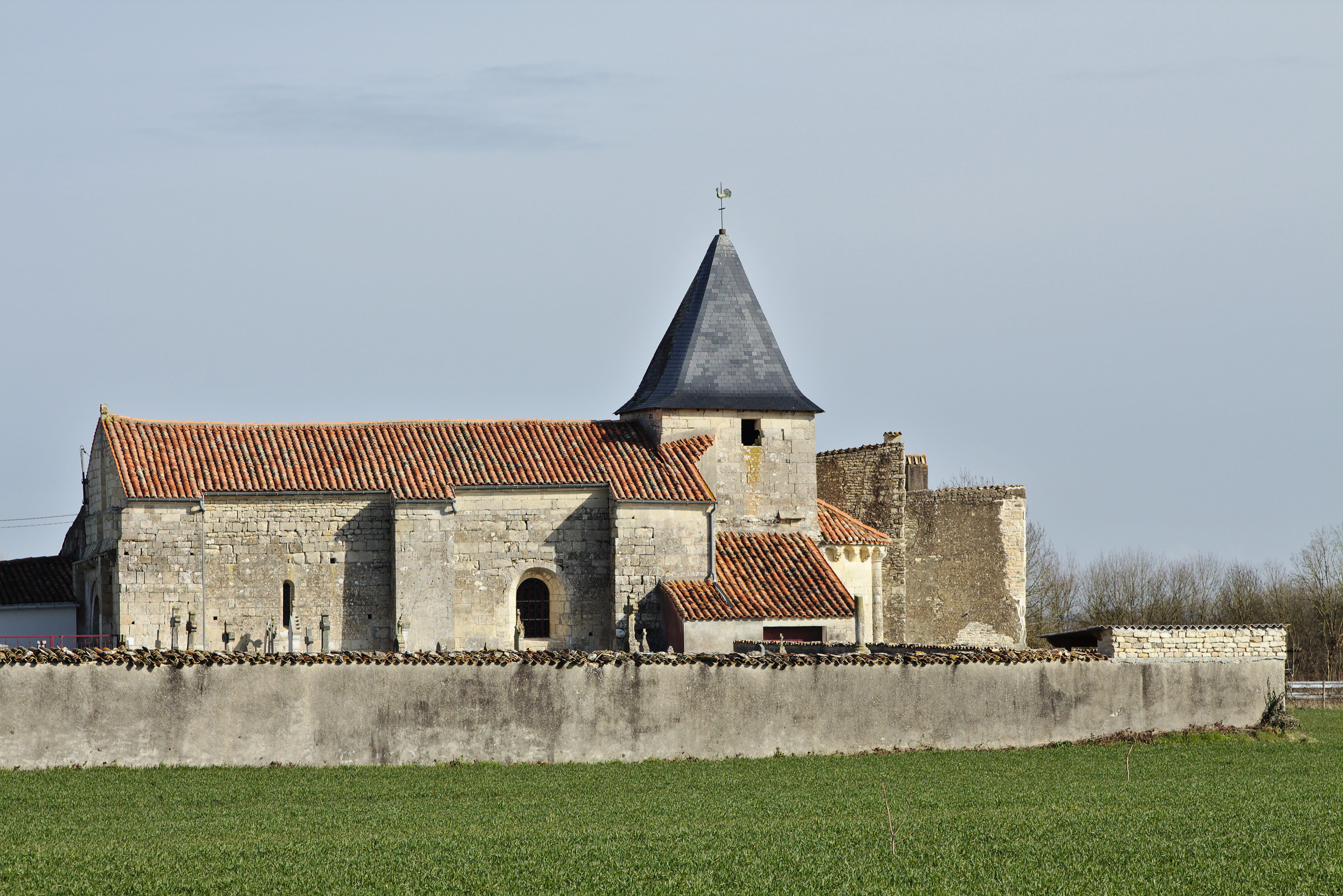 Église, Les Fosse, Deux-Sèvres, Poitou-Charentes, France